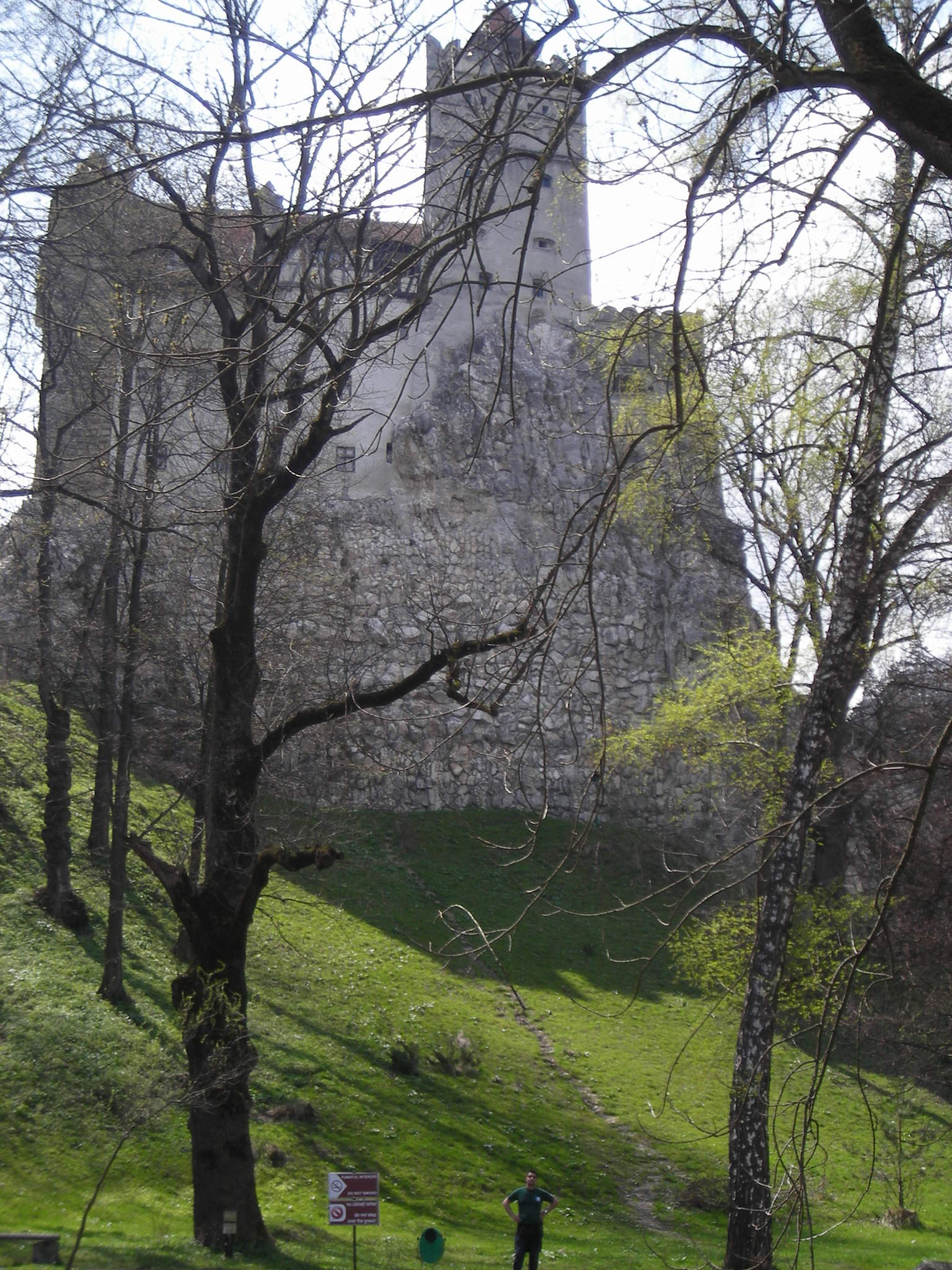 Castillo de Bran, desde abajo 01